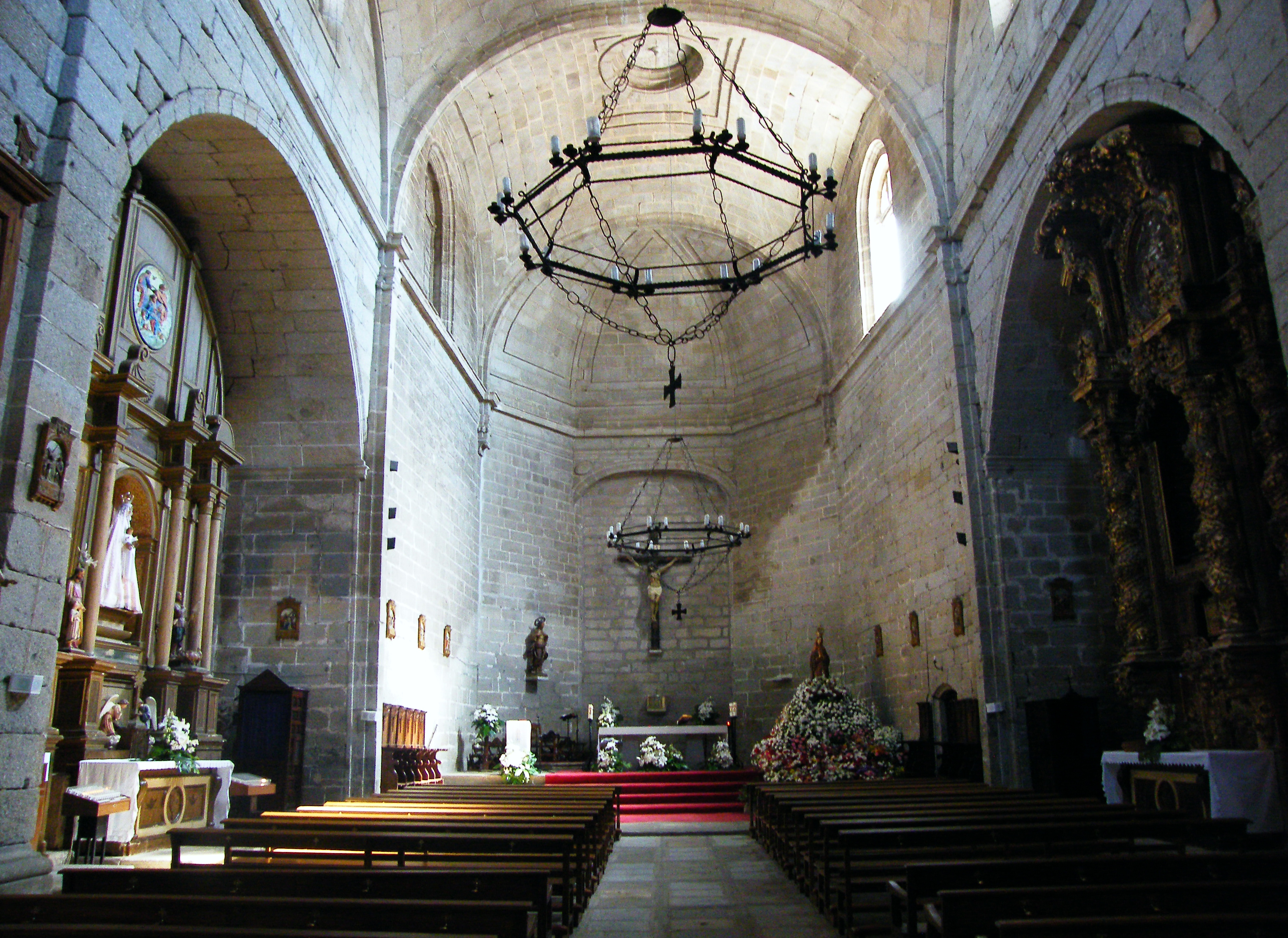 Navamorcuende (Toledo), iglesia parroquial, BIC: RI-51-0007407